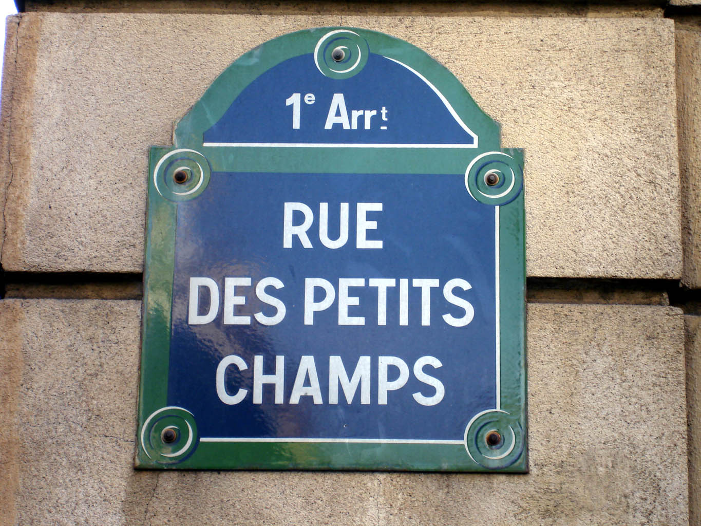 Plaque de la rue des Petits-Champs à Paris (France)